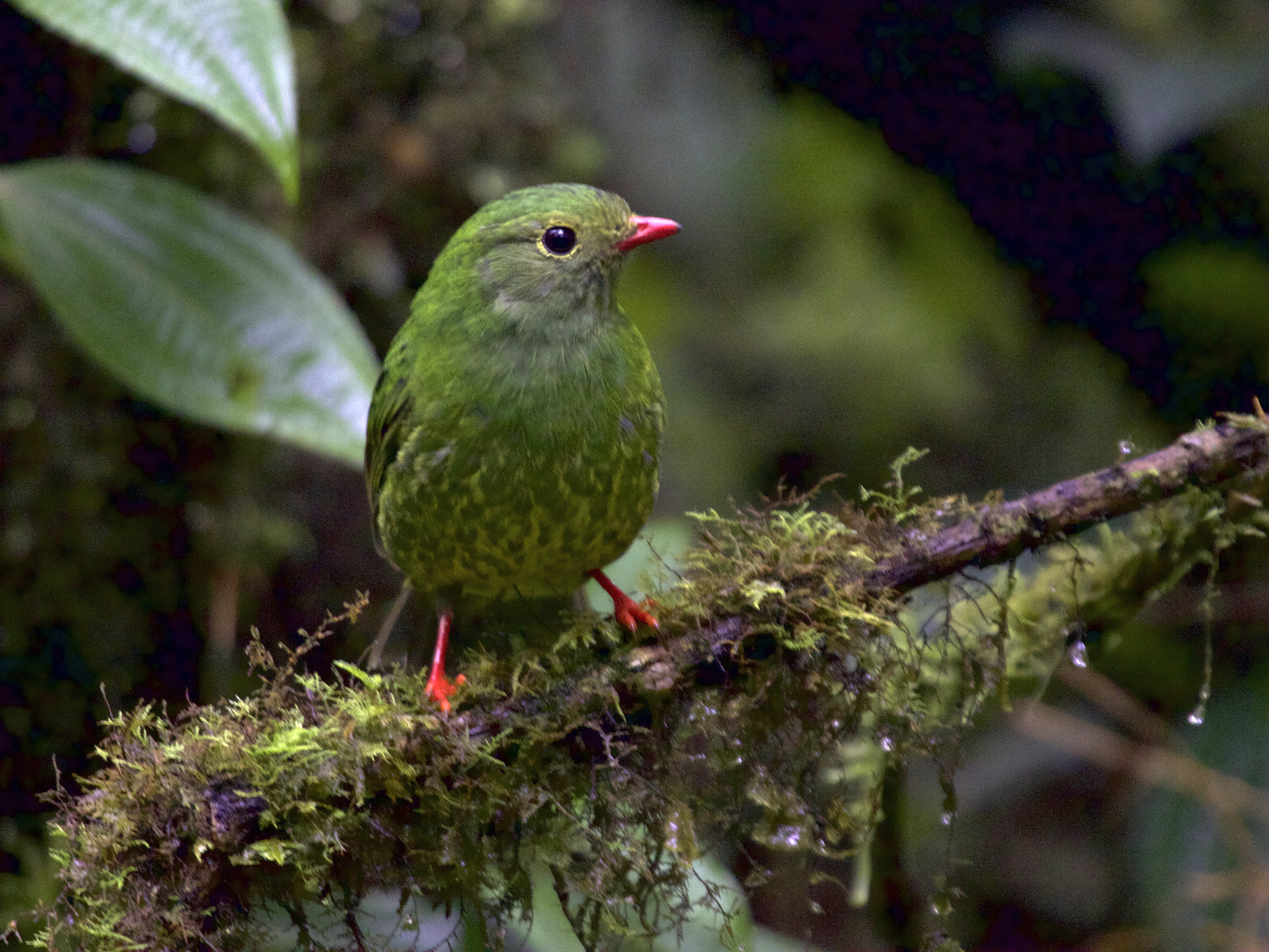 Pipreola riefferii. Photo prise à Manizales (Colombie).